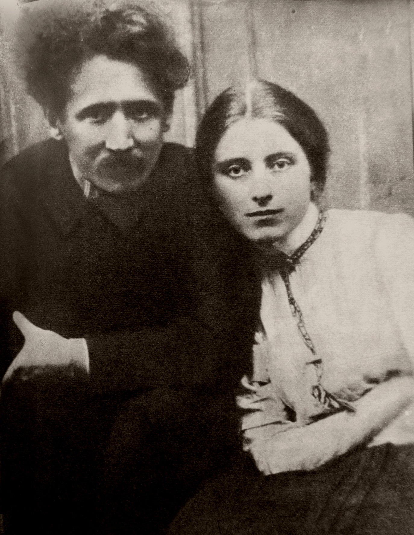 Чюрлянис с супругой.